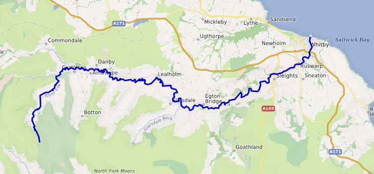 carte réalisée sur umap This map may be incomplete, and may contain errors. Don't rely solely on it for navigation.